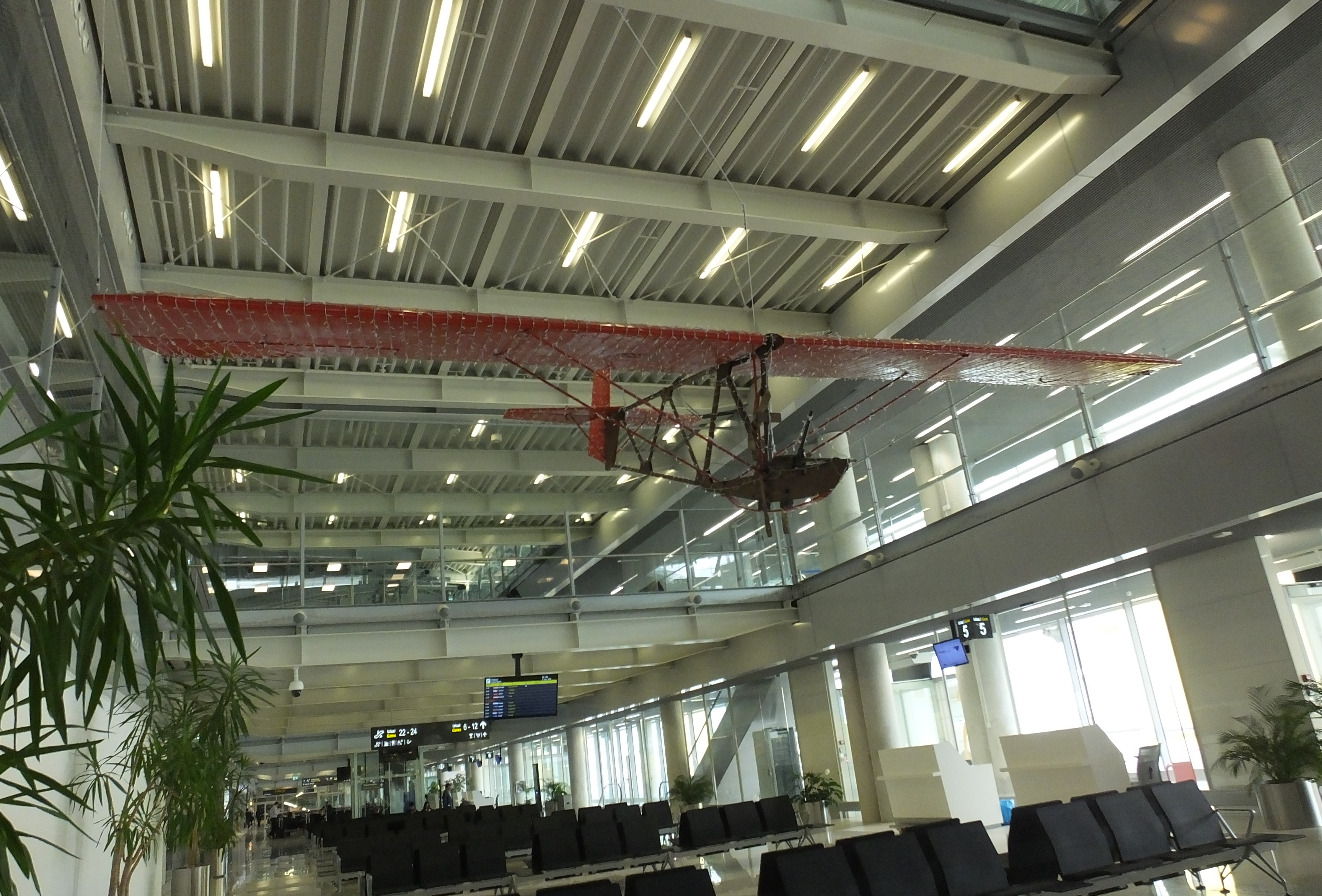 Hala odlotów portu lotniczego Dubrovnik. Rekonstrukcja szybowca Vrabac